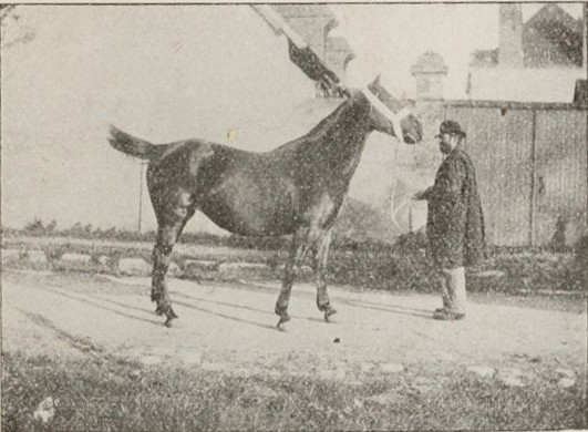 Cheval demi-sang berrichon dans l'ouvrage de Charles Cormier, 1905.